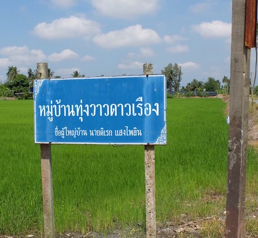 ป้ายหมู่บ้านทุ่งวาวดาวเรือง